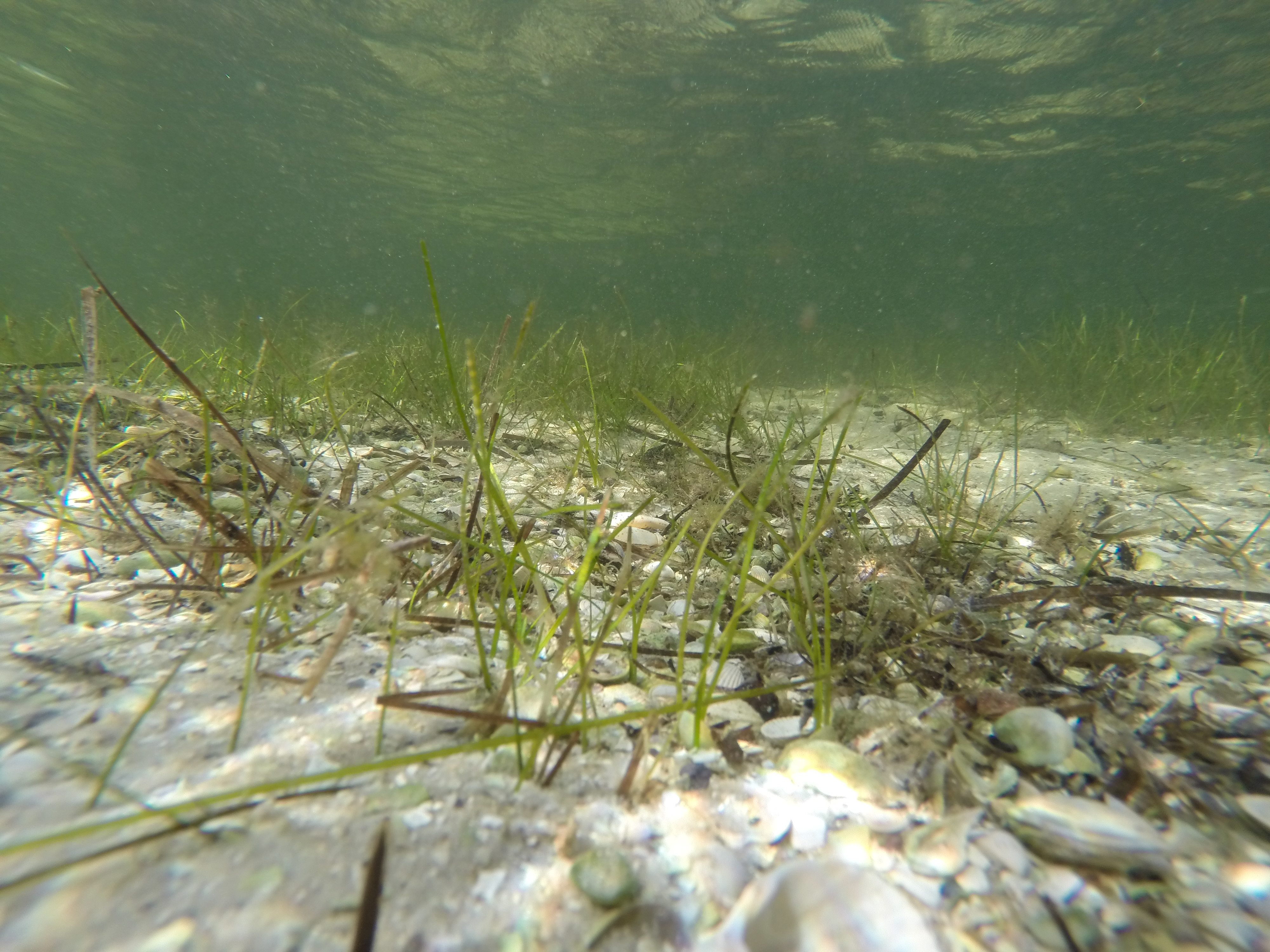 Знято під час експедиції на о. Джарилгач This photo/video of Dzharylhach was taken during Wikiexpedition to Dzharylhach supported by Wikimedia Ukraine. You can see all photographs in category Category:Wikiexpedition to Dzharylhach. English | українська | +/−